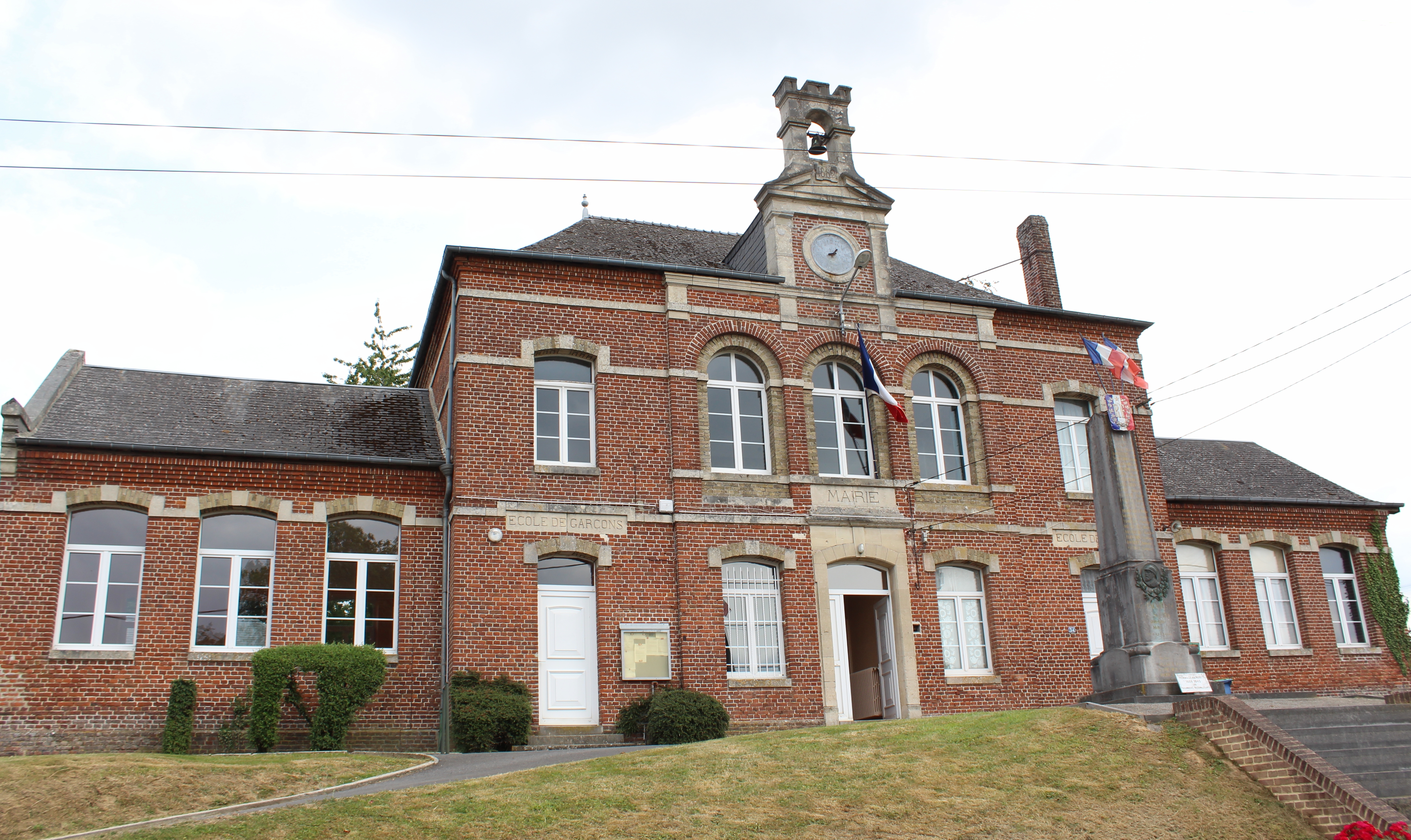 La mairie.